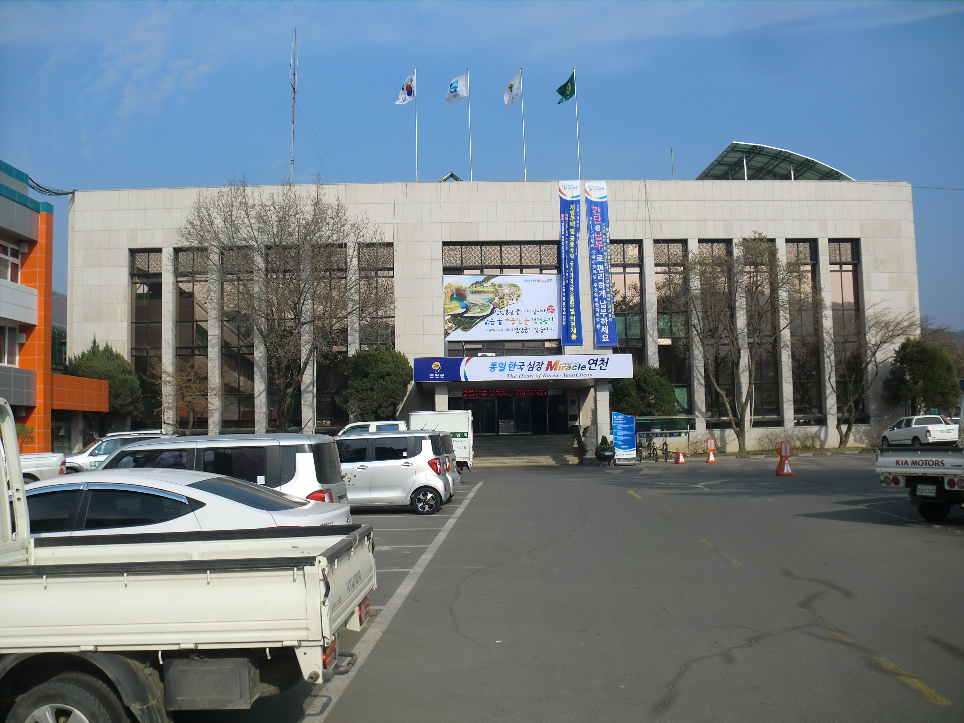 경기도 연천군에 있는 연천군청